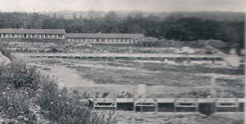 k.u.k. Armeeschiessschule